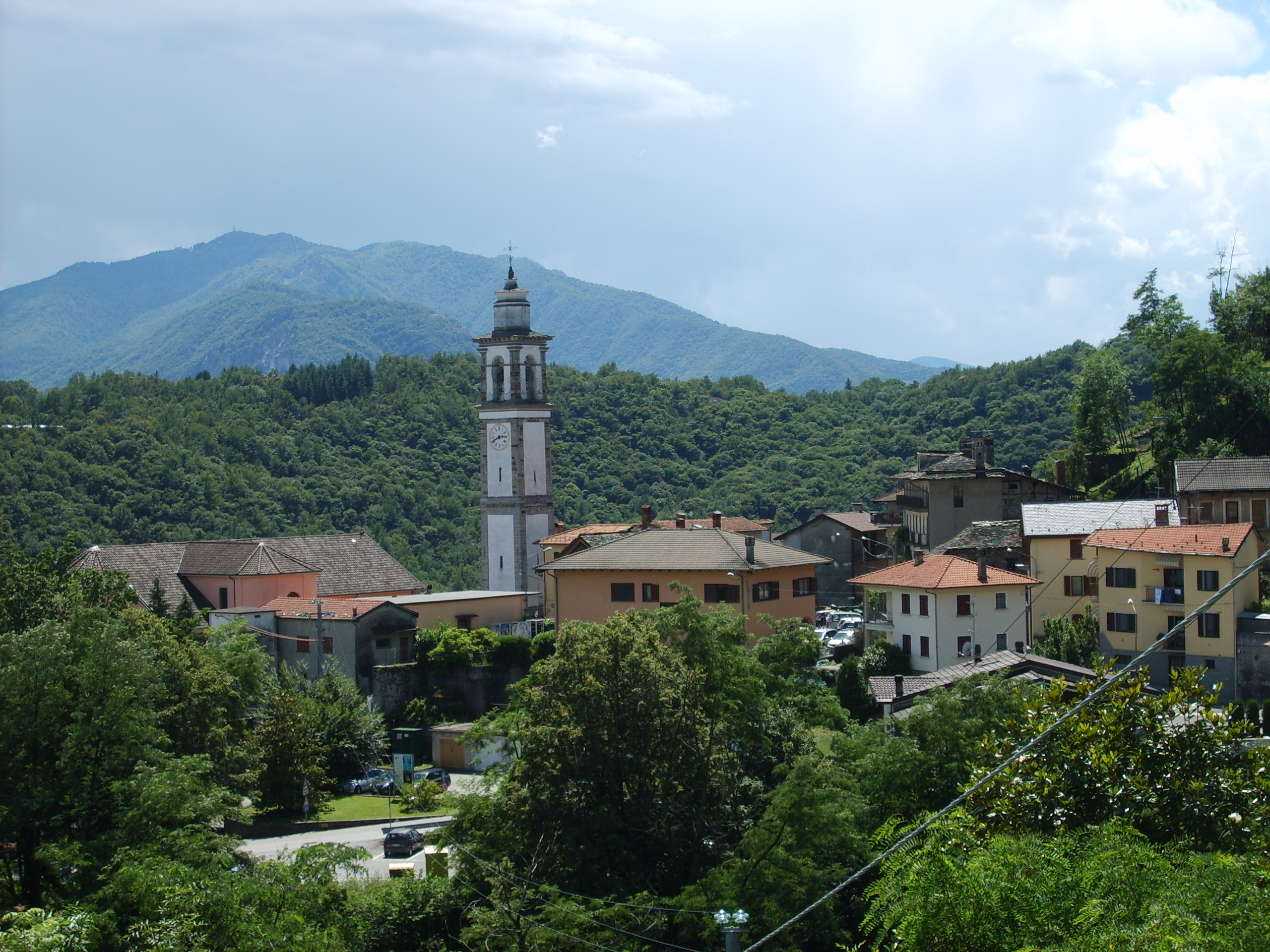 Cossogno vista sulla piazza centrale dal sentiero per la frazione Ungiasca